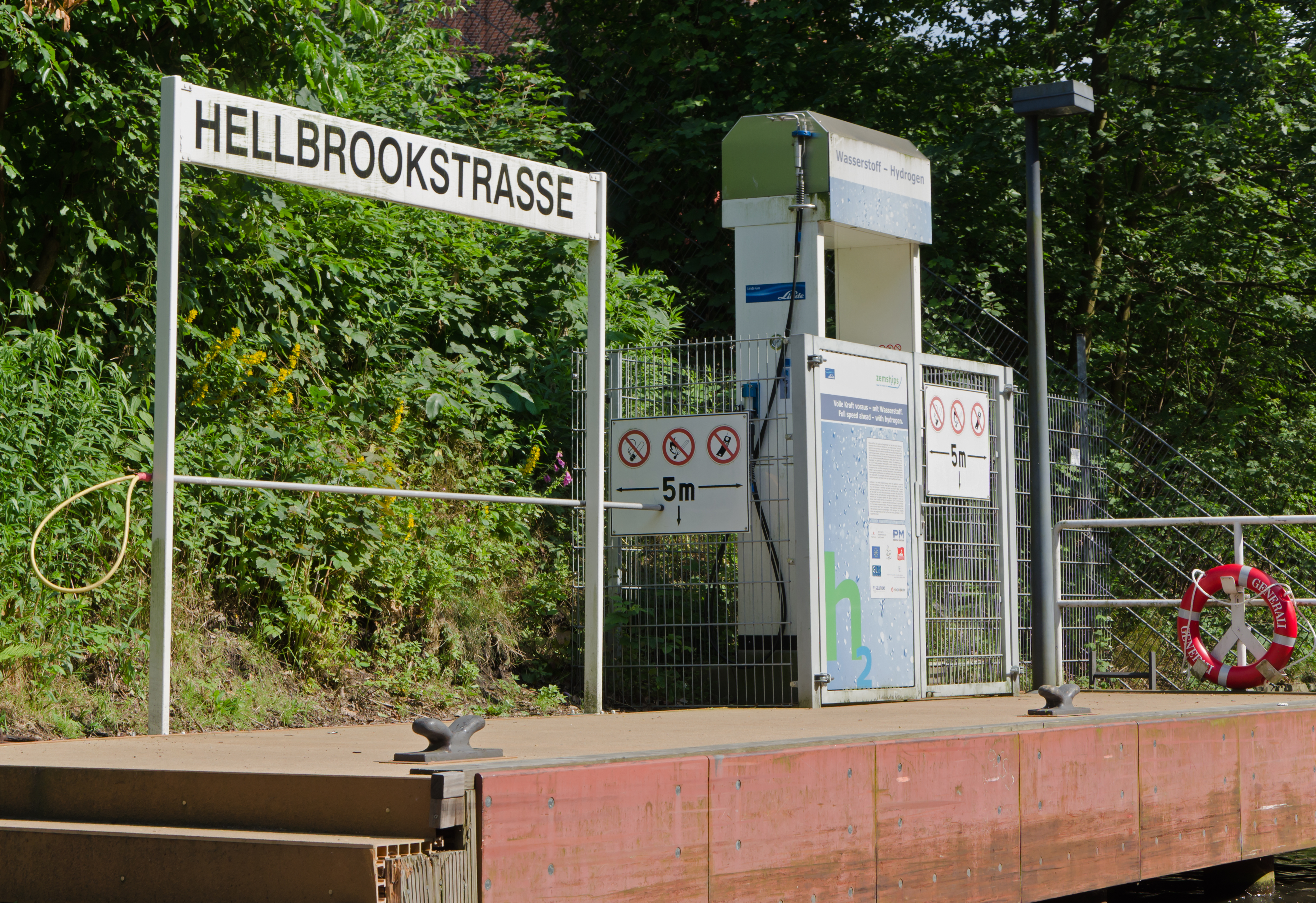 Wasserstofftankstelle für die Alsterdampfer ; Hellbrookstr. Barmbek-Nord